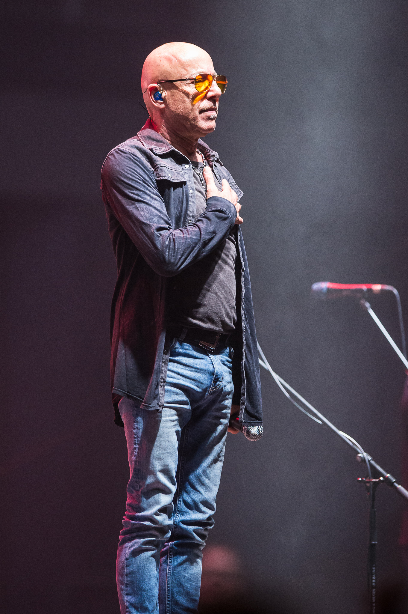 ARGO-Konzerte,City,Frankenhalle,Konzert,Livekonzert,Livemusik,Musik,Rock Legenden 2016,Toni Krahl